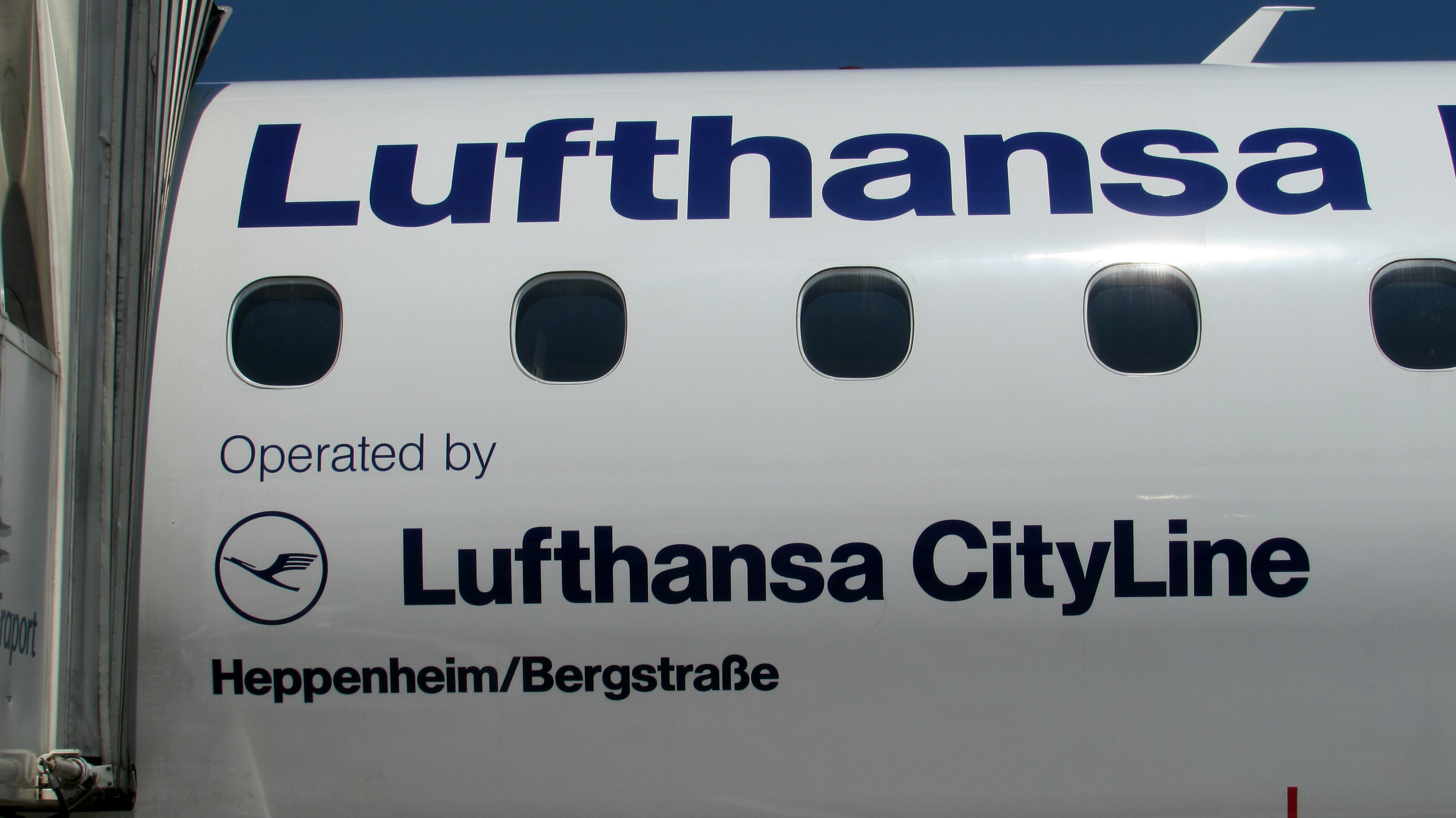 LufthansaCityLineHeppenheim